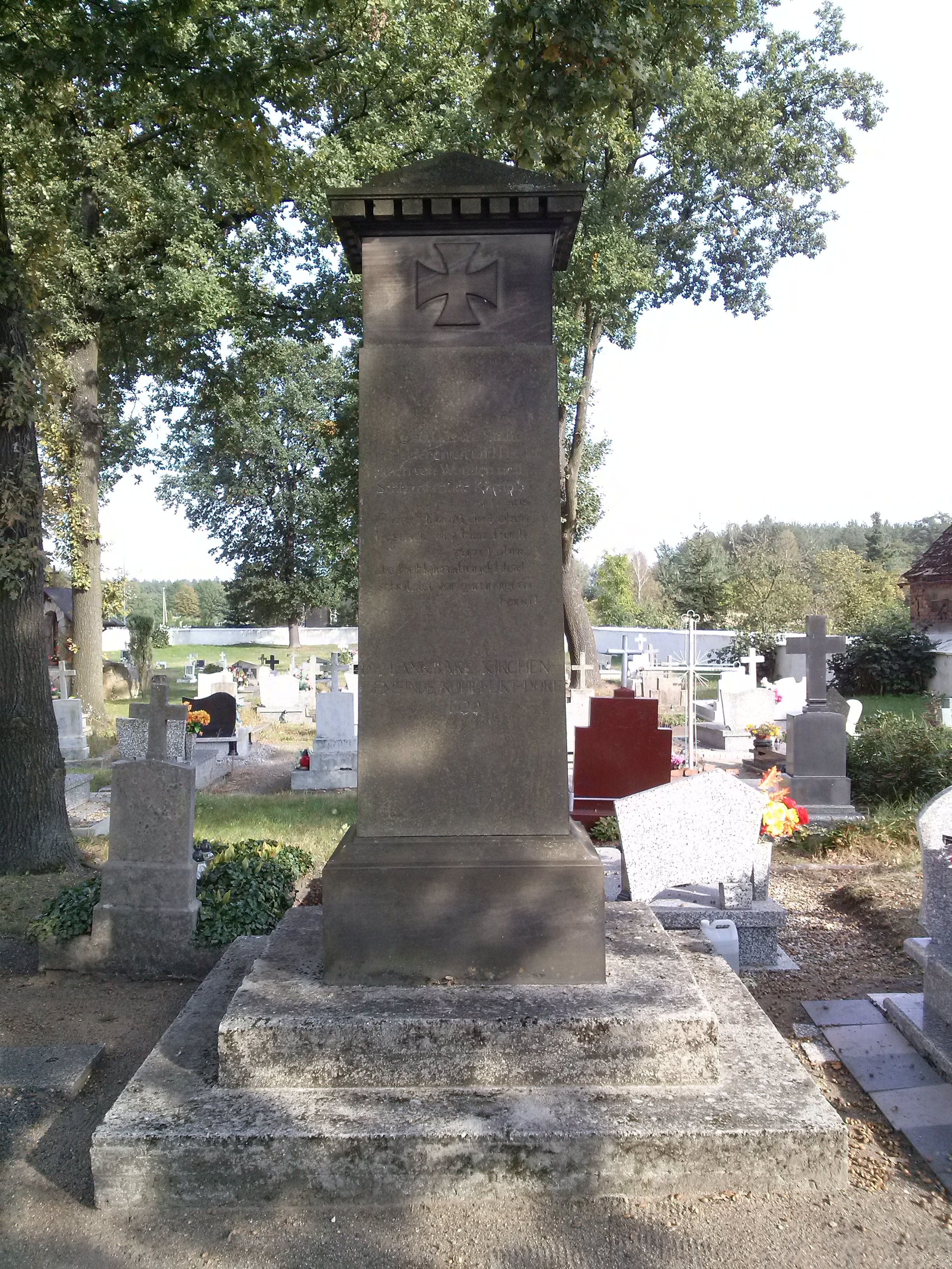 Pomnik żołnierzy mieszkańców Starego Węglińca (Kohlfurt-Dorf) poległych w I Wojnie Światowej na cmentarzu przy Kościele pw. Matki Boskiej Szkaplerznej